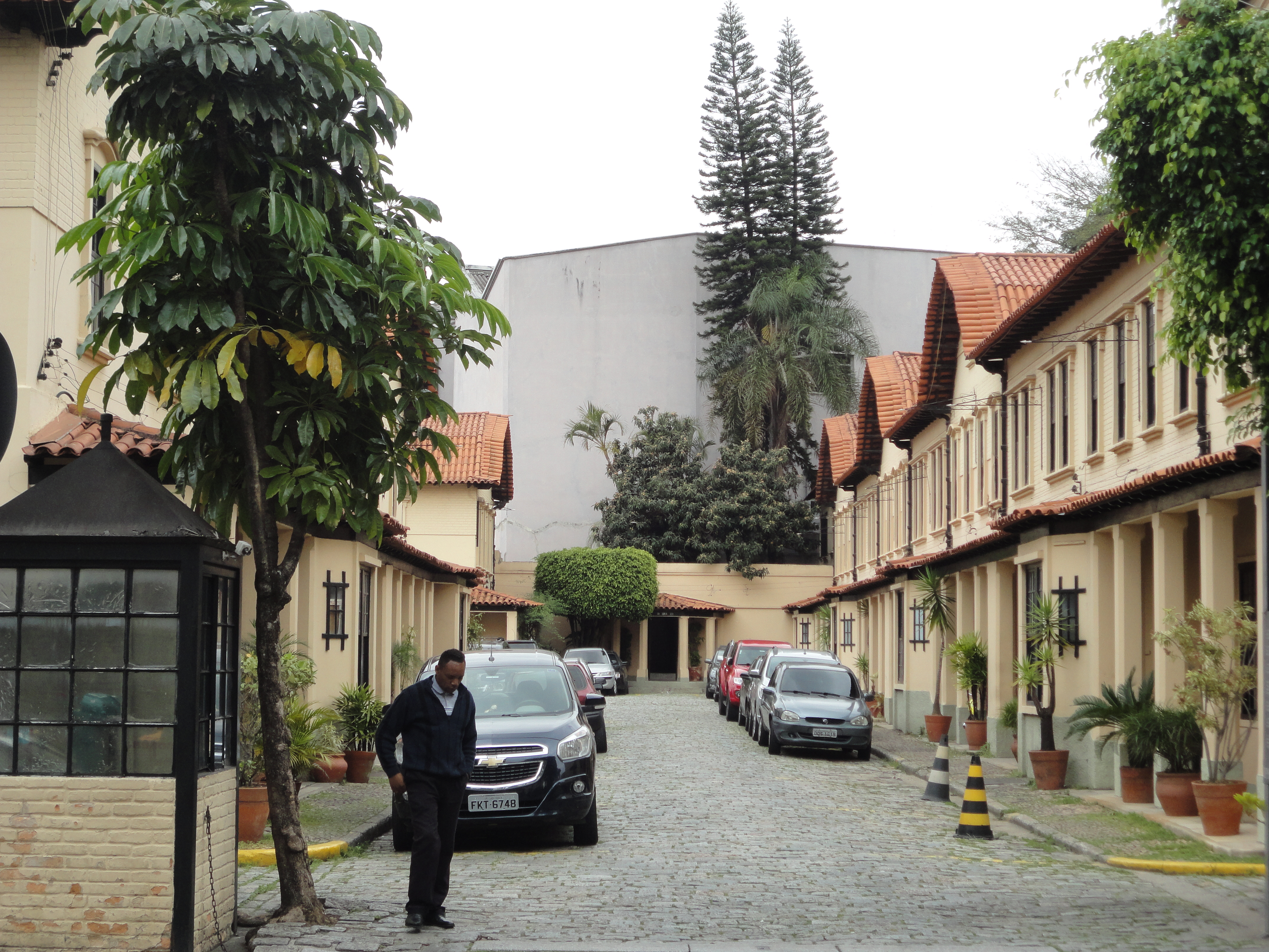 Detalhe da entrada da Vila dos Ingleses, em São Paulo (SP), Brasil.